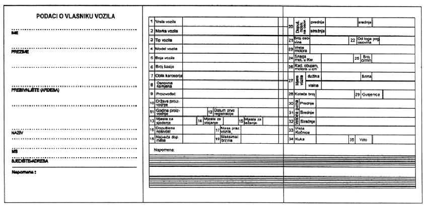 Izvor